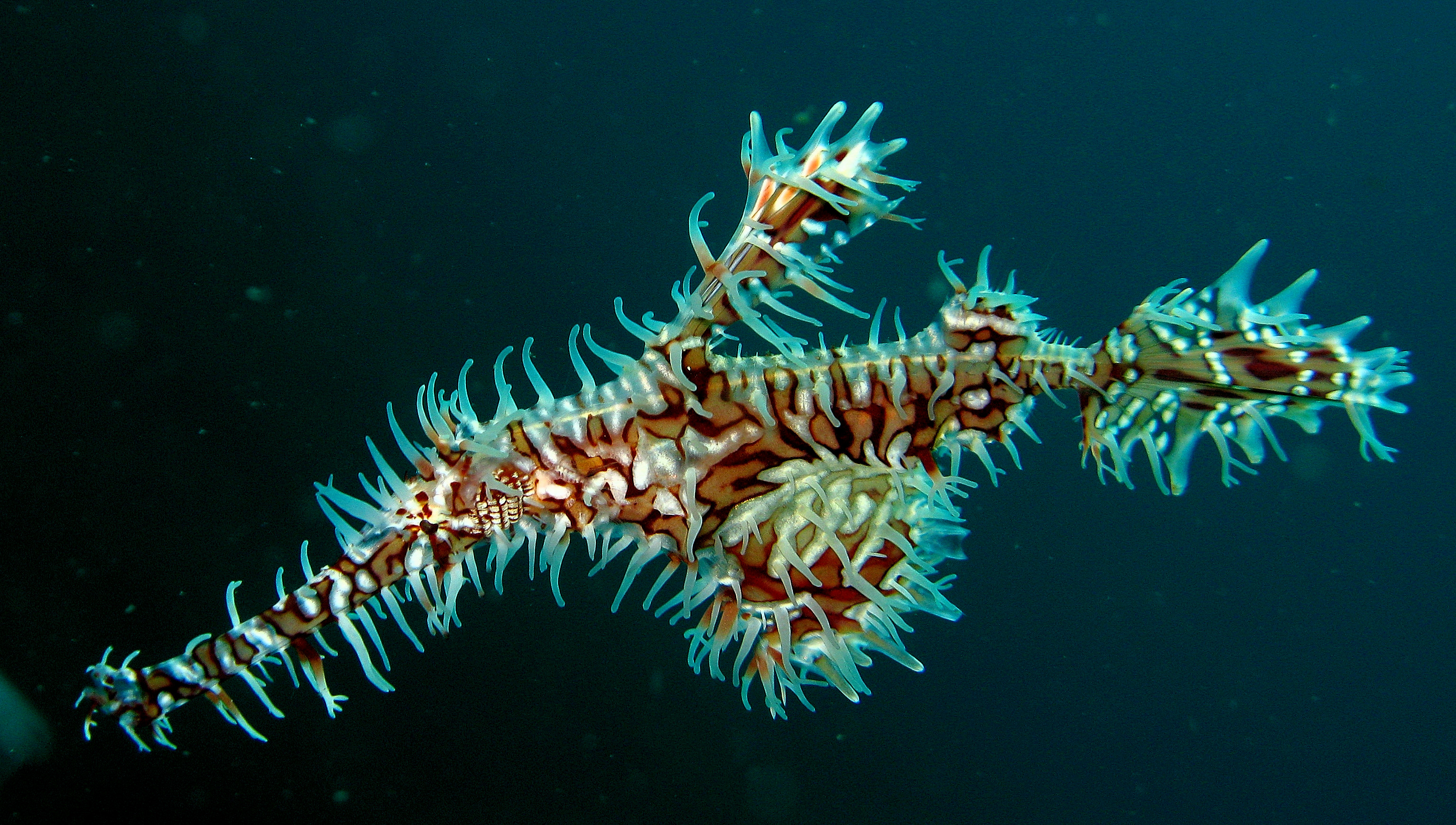 Solenostomus paradoxus, Lembeh Straits, Indonesia